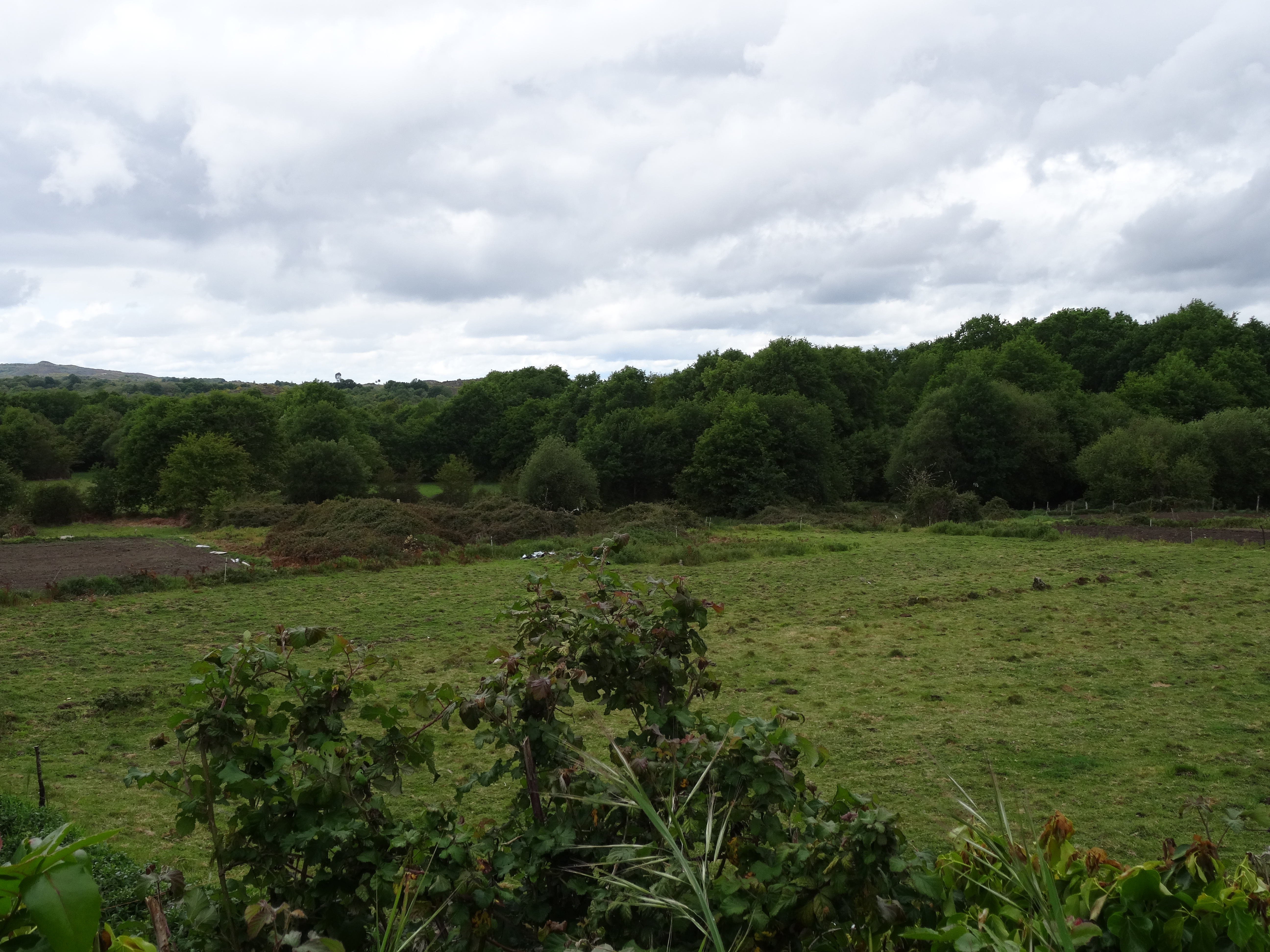 Ver título.